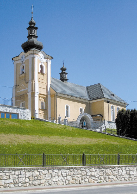 Kostol sv. Ondreja. Chmeľnica, okres Stará Ľubovňa